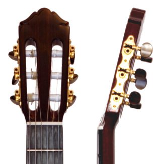 La tête d'une guitare acoustique et ses chevilles.